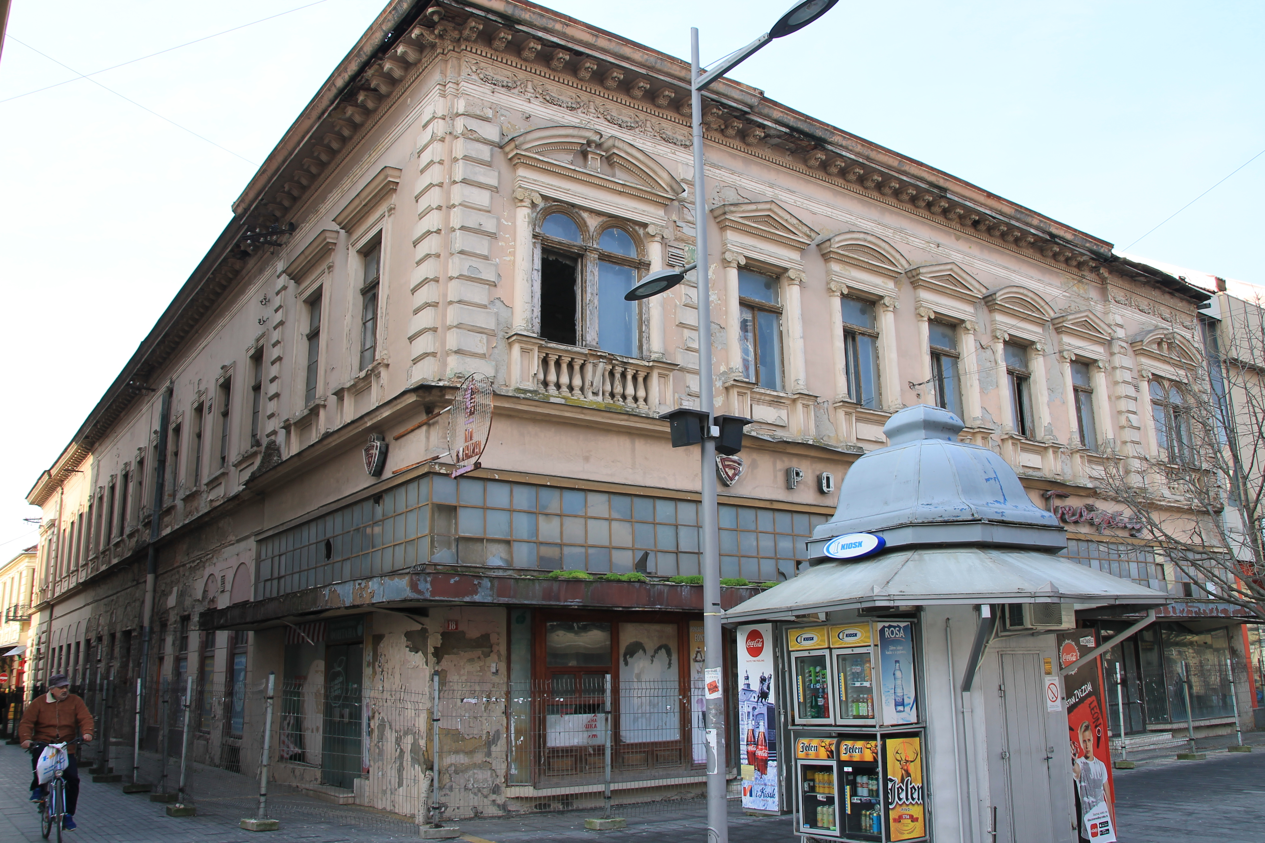 Staro jezgro Zrenjanina